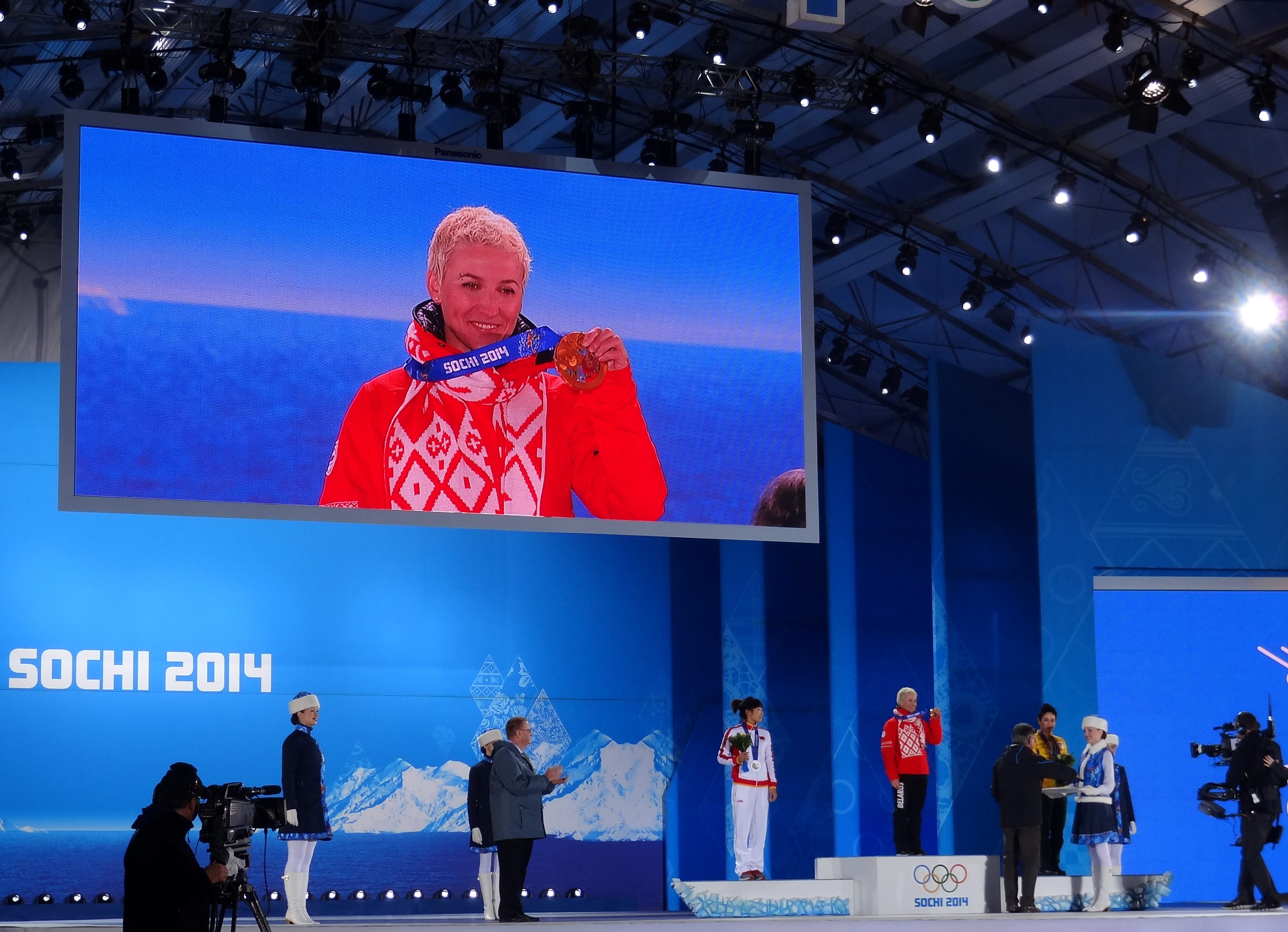 Церемония награждения состоялась 15 февраля на Медальной площади в Сочи. Призеры XXII зимних Олимпийских игр в Сочи: 1. Алла Цупер (Беларусь) 2. Сю Ментао (Китай) 3. Лидия Лассила (Австралия)